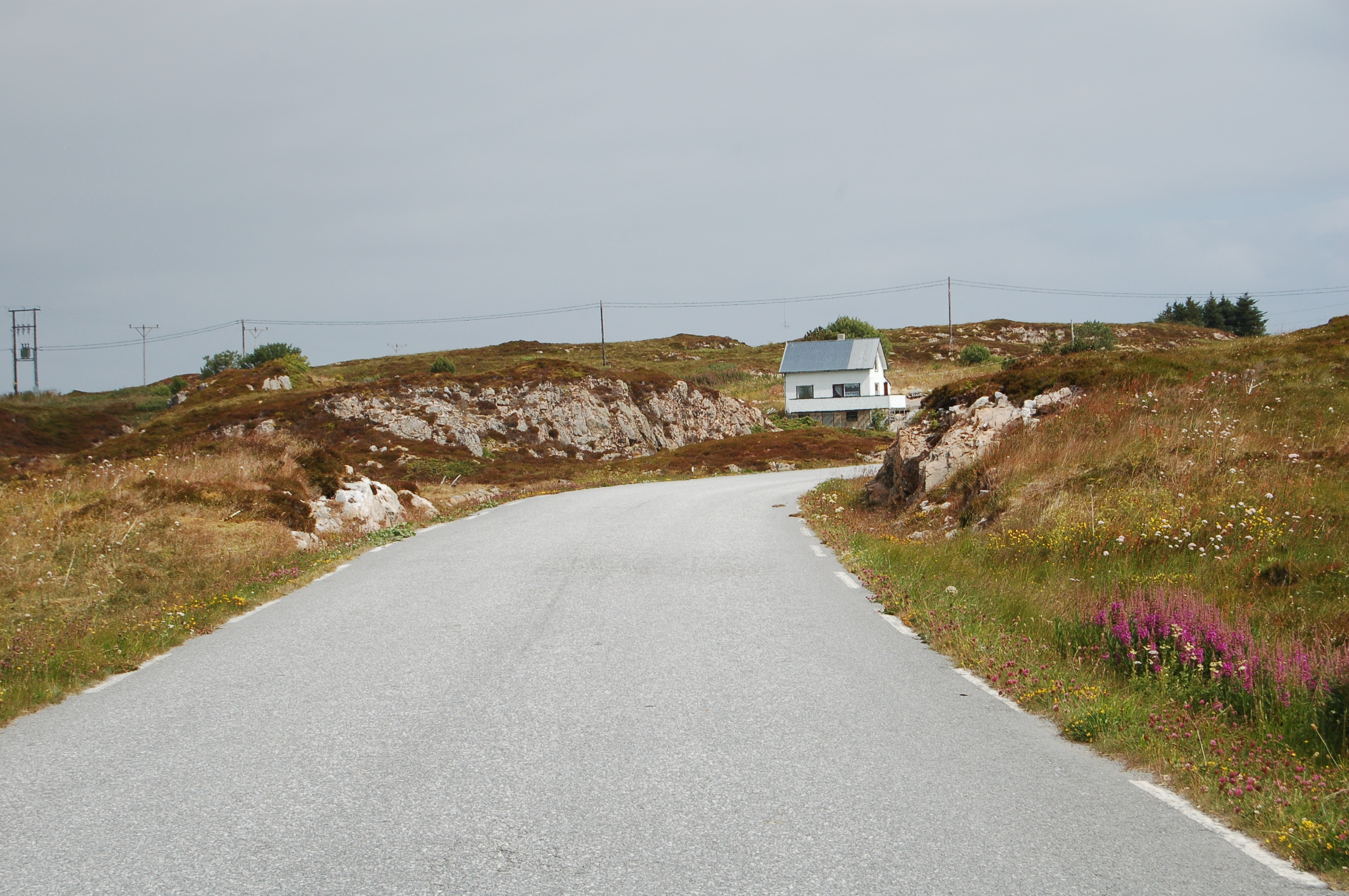 Uttian, Frøya, Sør-Trøndelag.